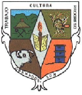 Escudo del municipio sonorense.